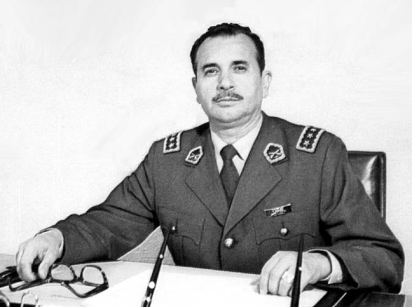 César Leonidas Mendoza Durán (Santiago de Chile, 11 de septiembre de 1918 — íd., 13 de septiembre de 1996) fue un militar, político y medallista olímpico chileno, General Director de Carabineros y jinete profesional en equitación. Fue miembro de la Junta Militar que derrocó a Salvador Allende en 1973, y se mantuvo en ella hasta su renuncia en 1985.